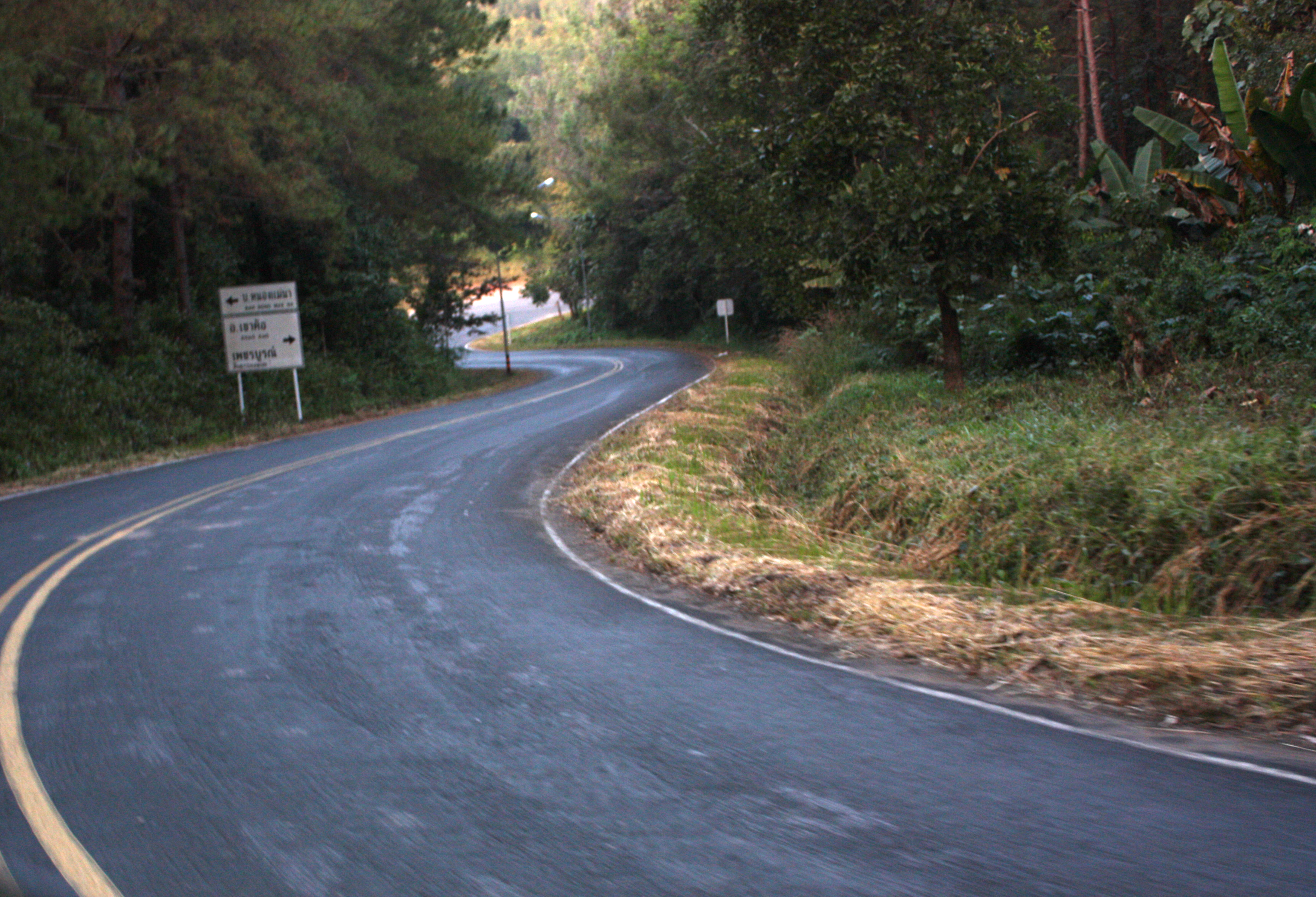 ทางขึ้นเขาค้อ จ.เพชรบูรณ์